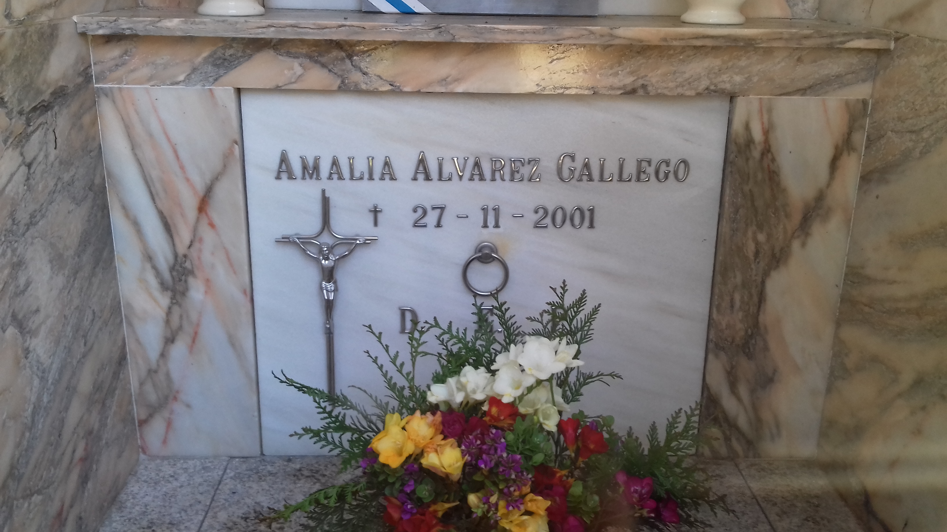 Lápida de Amalia Álvarez Gallego